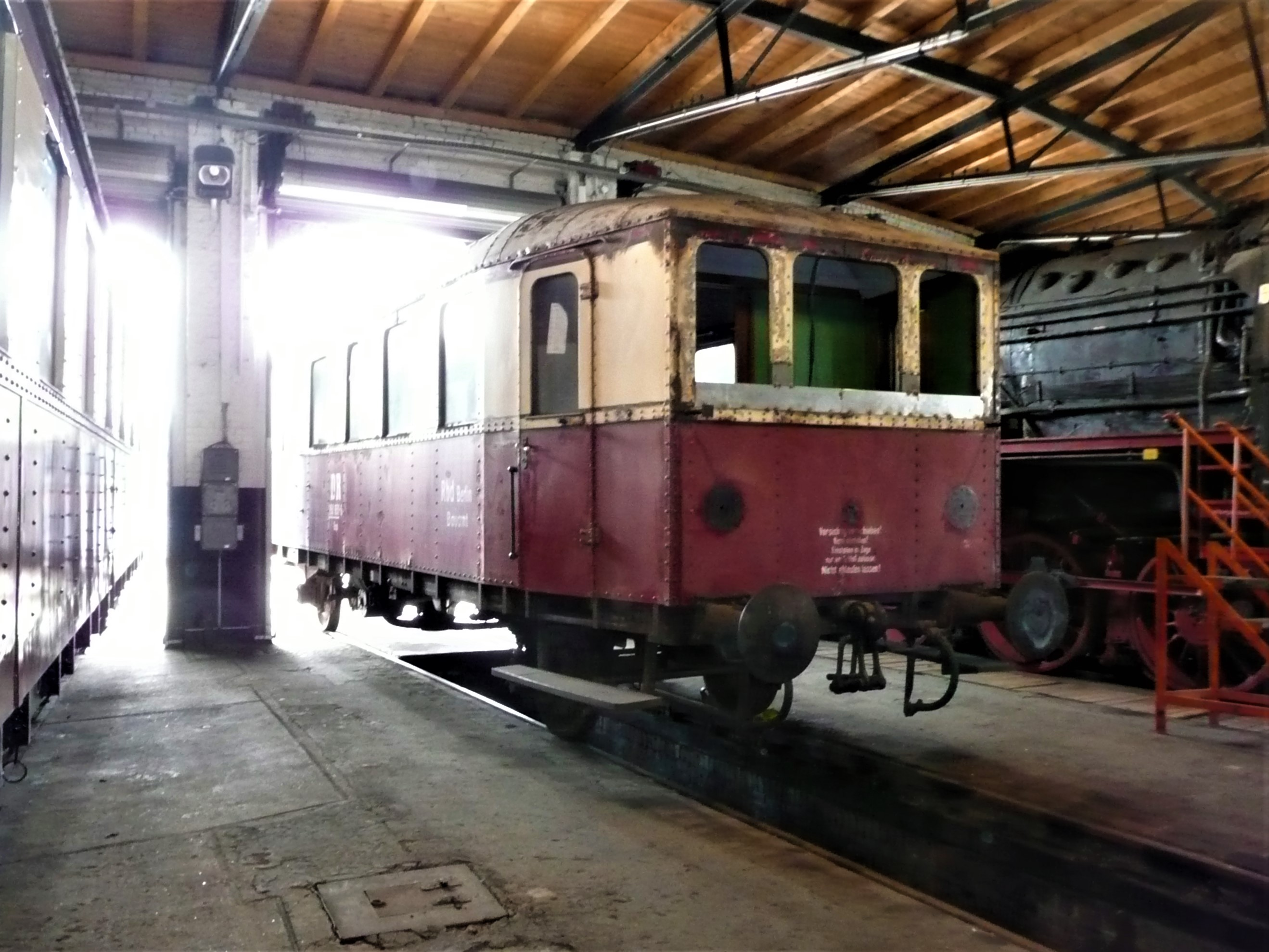 Beiwagen Beiwagen 190 851-6, ehemaliger Triebwagen DR 804 im historischen Lokschuppen Wittenberge